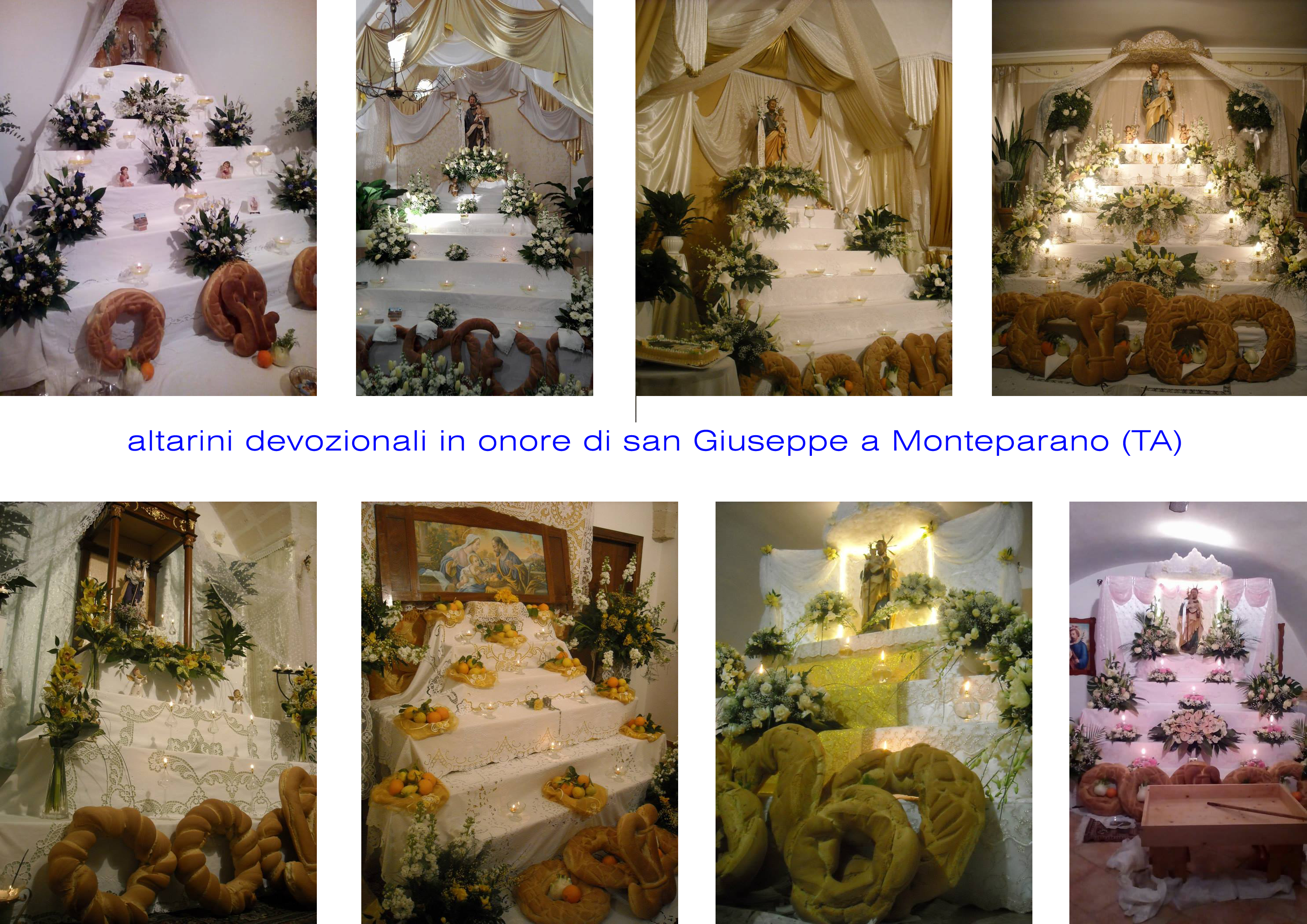 Altarini